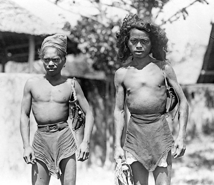 Repronegatief. Twee mannen uit Wahai, Ceram